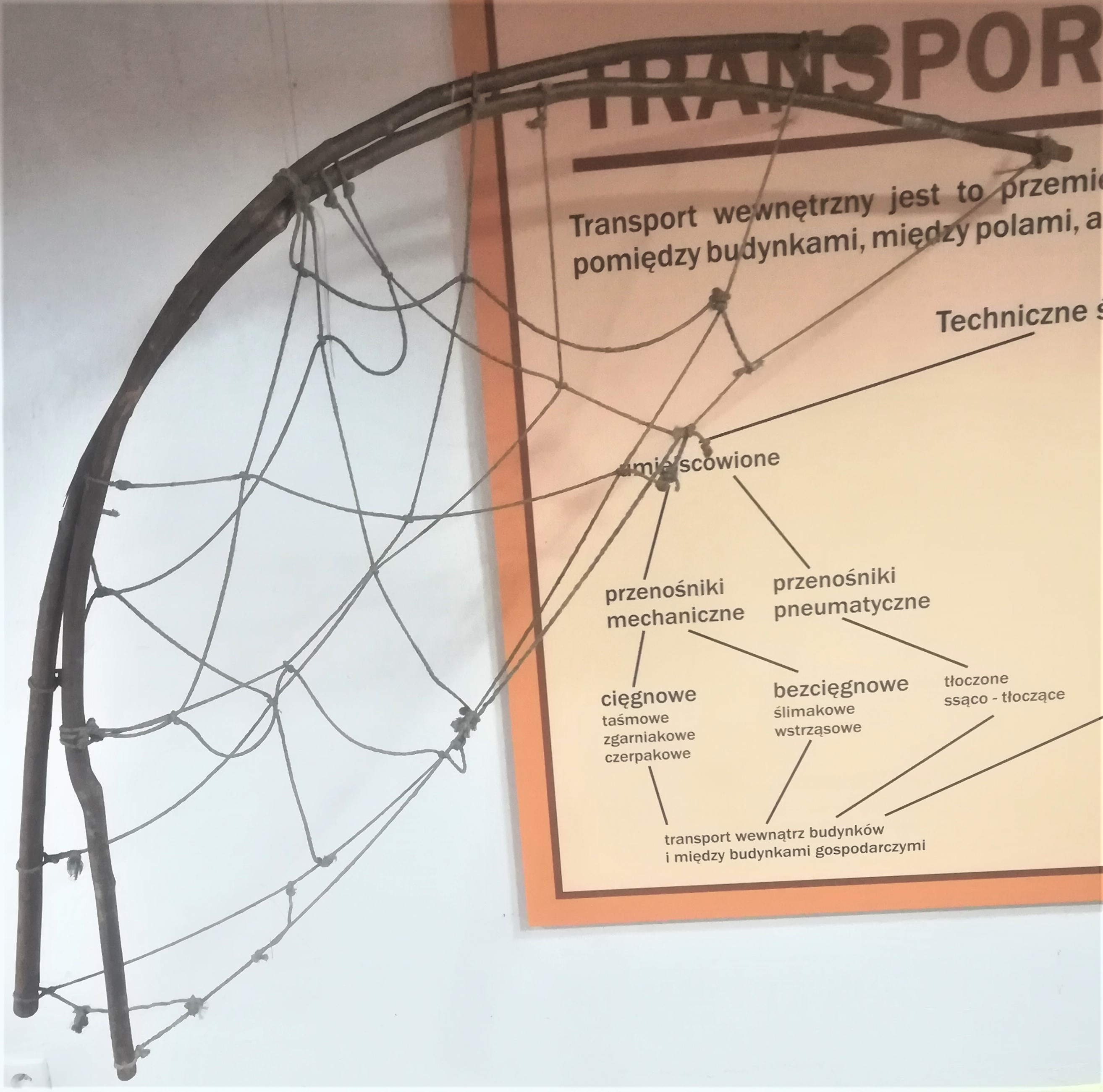 Rezginia w Muzeum Rolnictwa w Szreniawie.